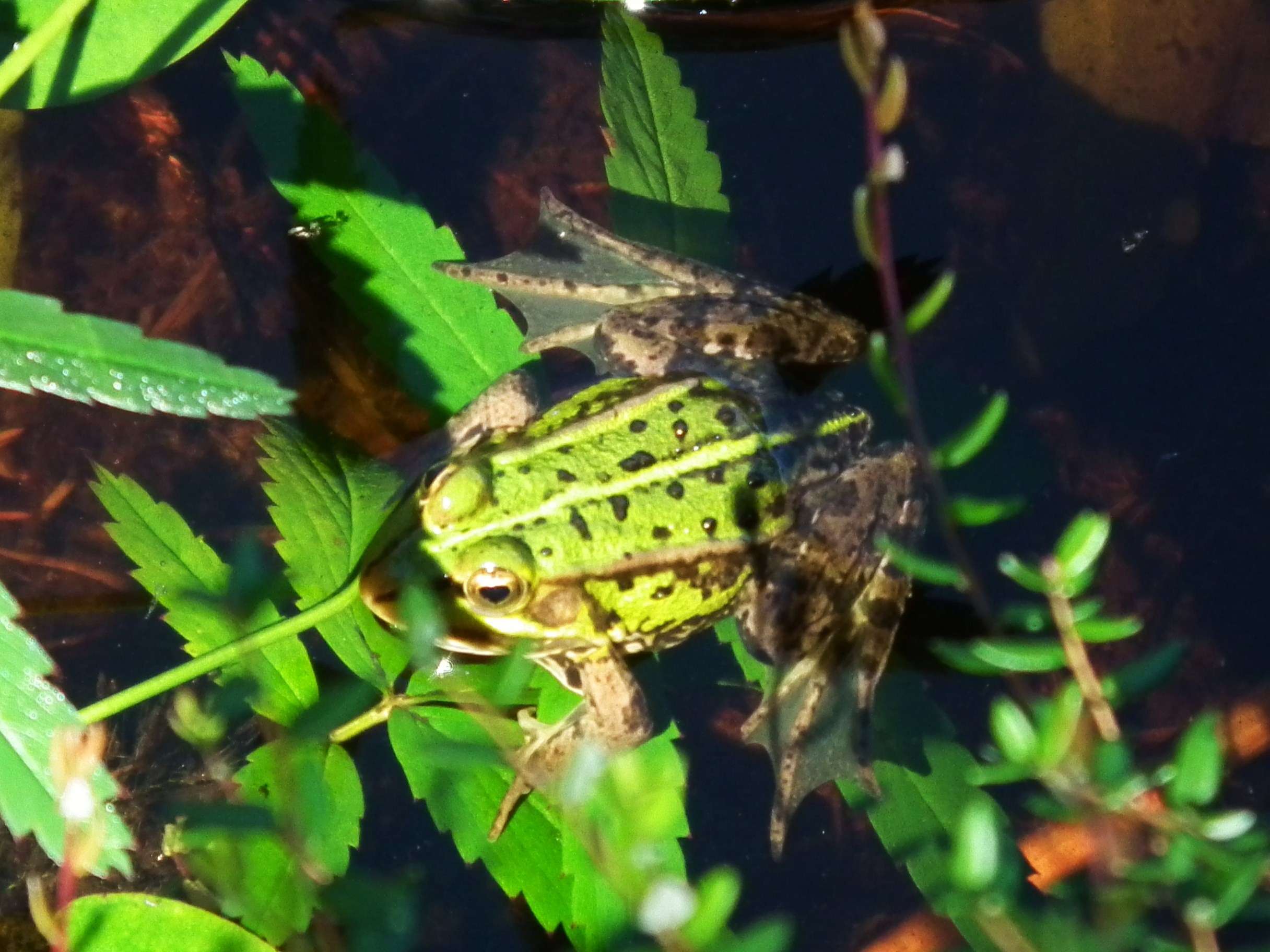 Pętla Lipnickiego w PN Bory Tucholskie. Dawne wyrobisko torfu.